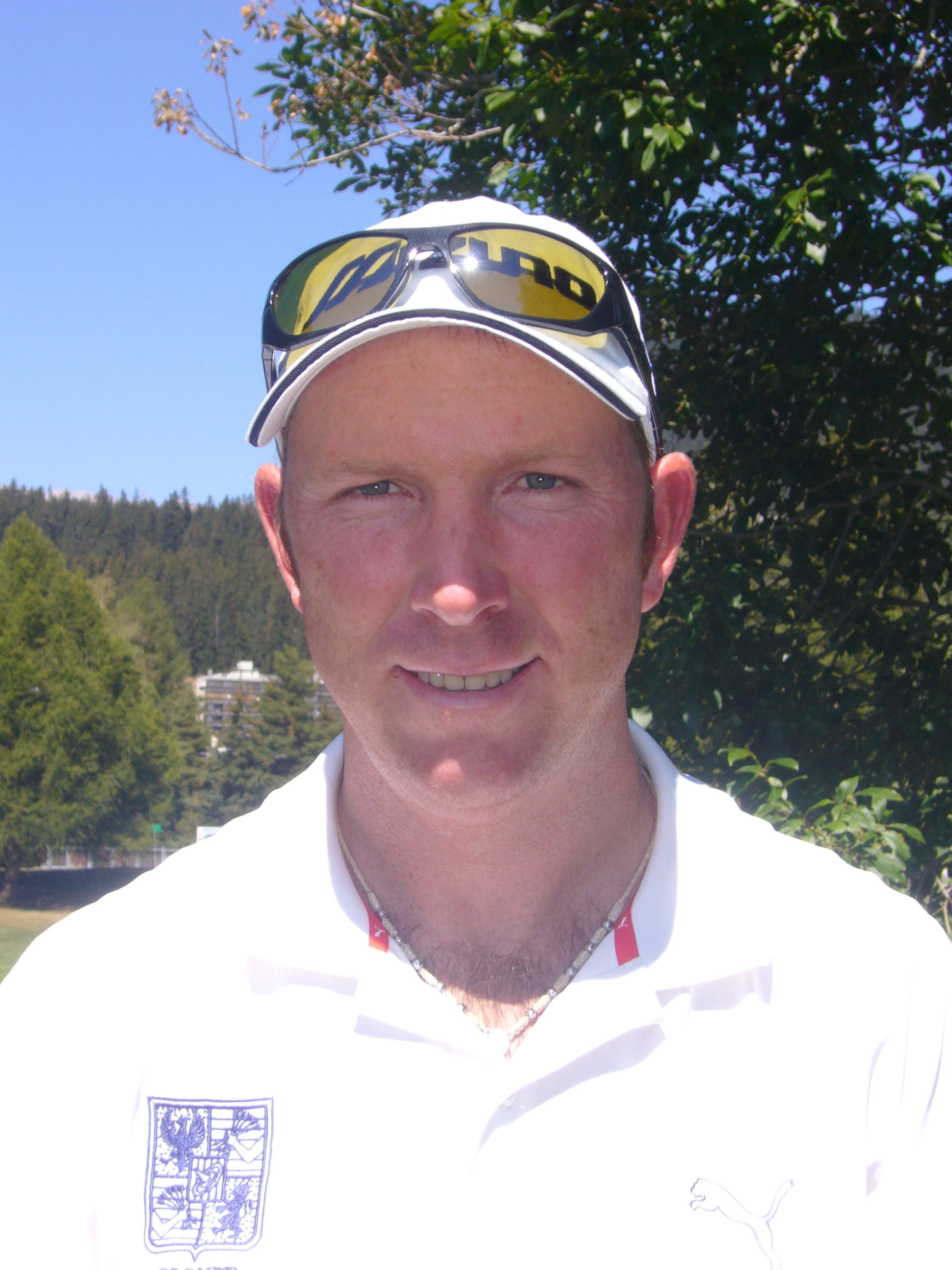 Daniel Vancsik, Argentijns golfer, tijdens Zwitsers Open 2009